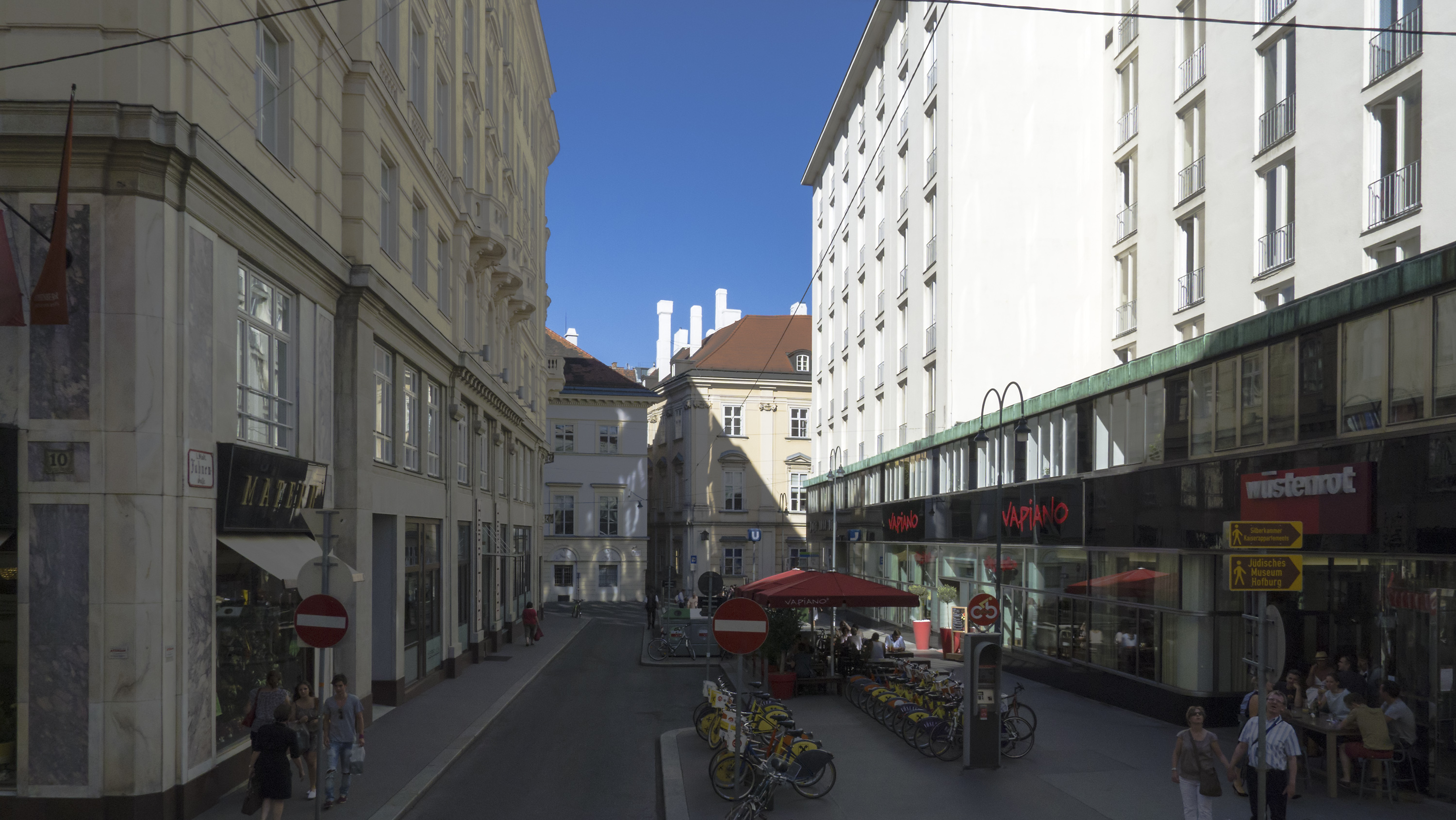 Fahnengasse in Wien 1 bei der Herrengasse Richtung Nordosten